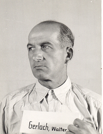 Walter Gerlach (* 25. August 1896 in Gusow; † 19. April 1964 in Haiger) war deutscher SS-Oberführer, Gefängnisleiter des Columbiahauses und Lagerkommandant im KZ Sachsenburg während der Zeit des Nationalsozialismus